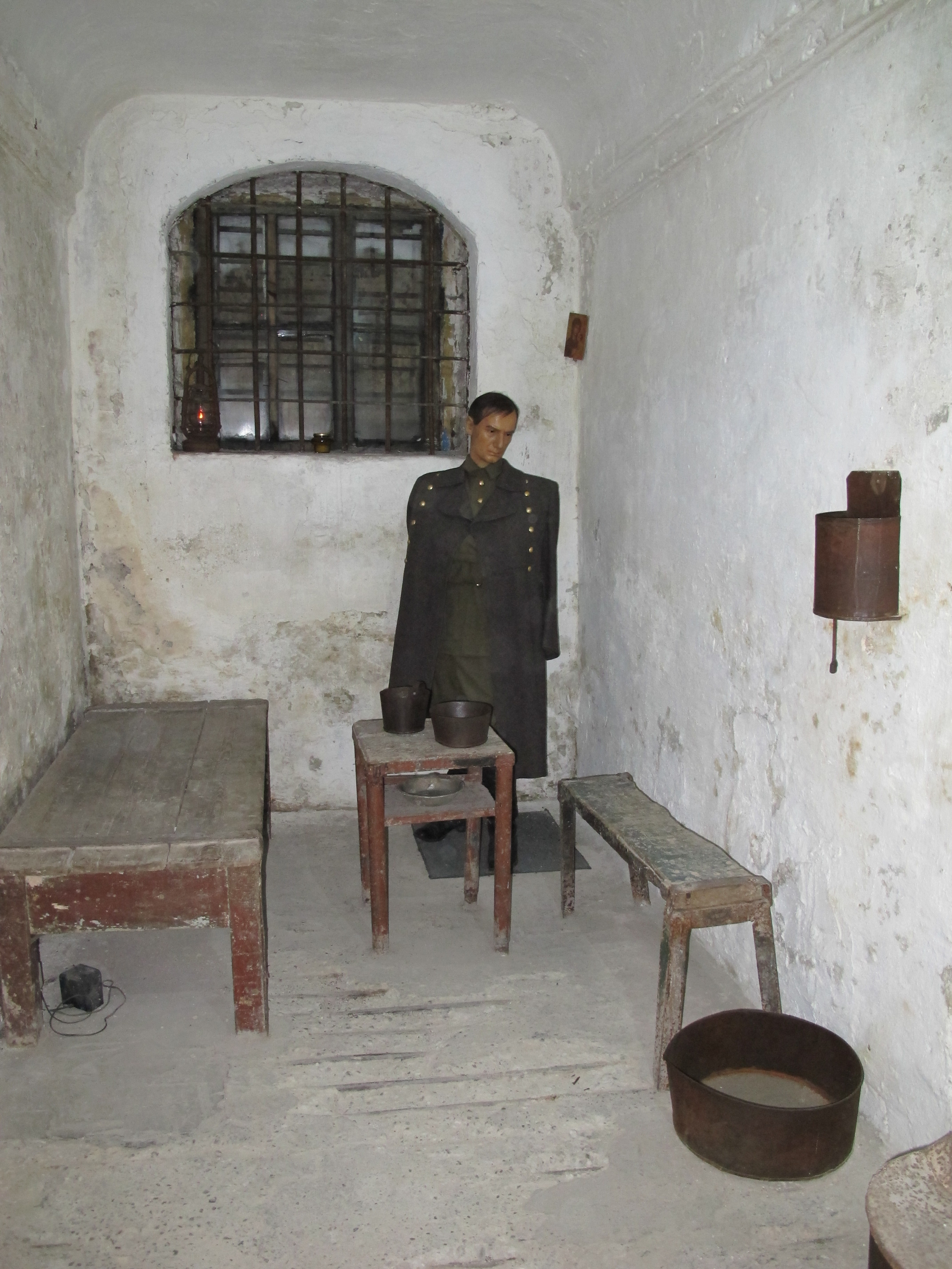 Камера Колчака в Иркутской тюрьме